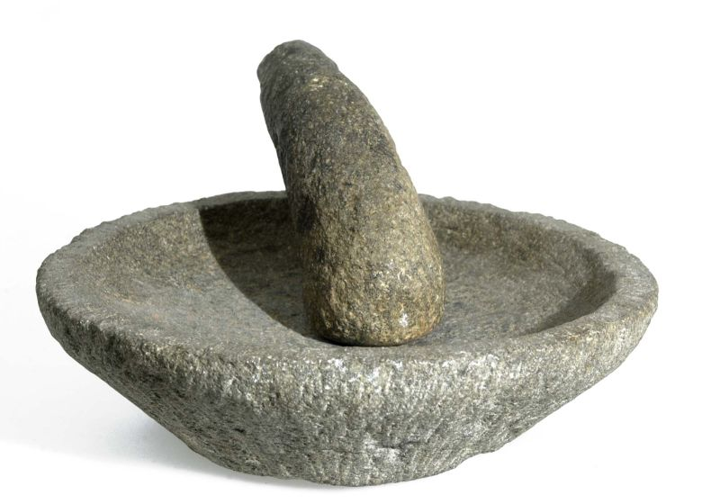 Bord. Massief stenen bord waarin sambal wordt gemaakt m.b.v. een stenen stamper. Lombok wordt met wat zout, trasi en soms ook rode uien fijngewreven.. Stenen bord met stamper voor het maken van sambal Unknown language: Cowék